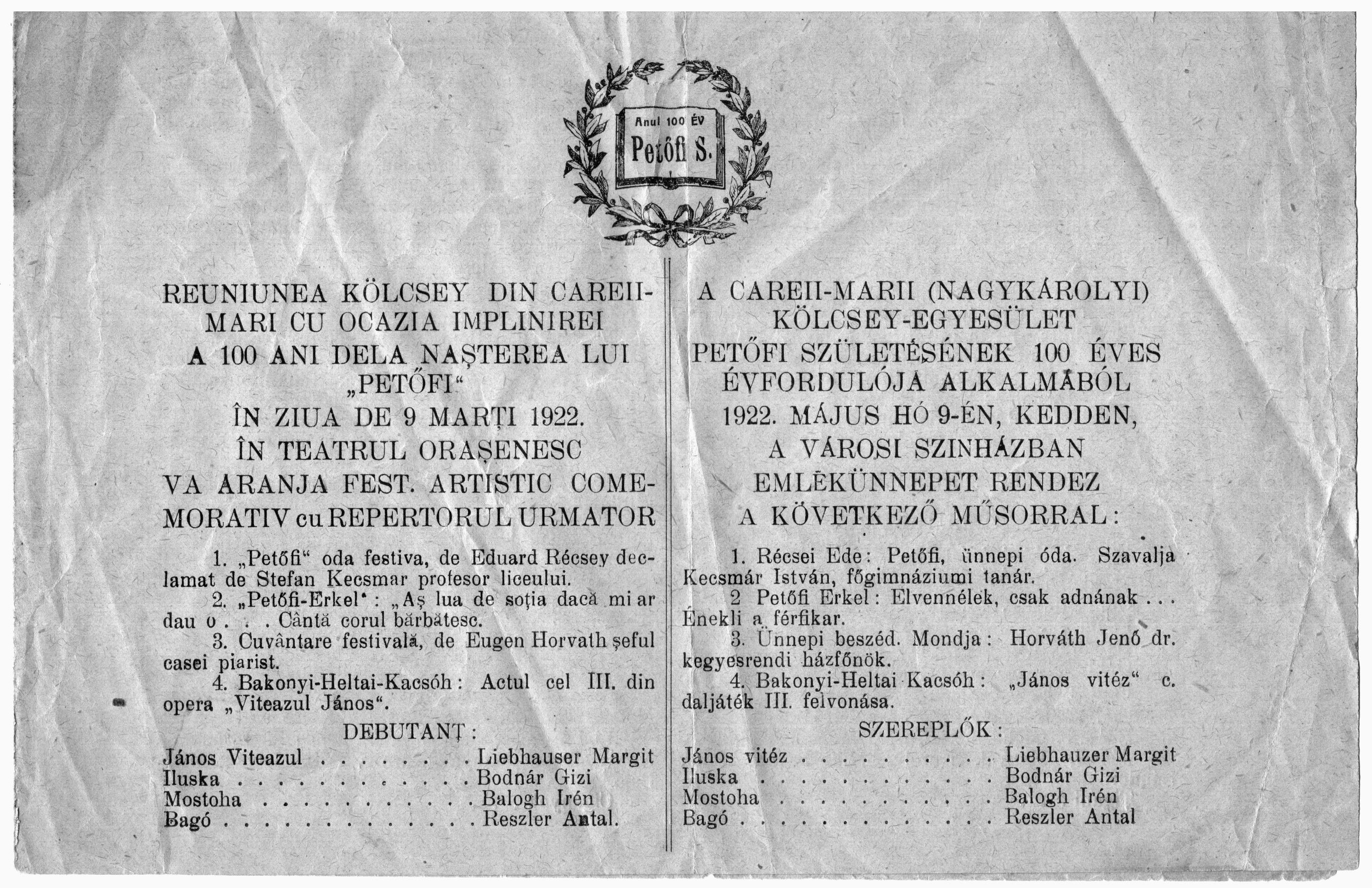 A Nagykárolyi Kölcsey Egyesület meghívója a Városi Színházba. 1922. május 22 -e. A meghívót 2013. augusztus 4 -én szkenneltem. ©© Published under Creative Commons in the Metapolisz DVD line. All of the photos and vids in the Metapolisz DVD line are under Creative Commons and can be used even for commercial – for profit – purposes. Recommended Citation Derzsi Elekes Andor: Metapolisz DVD line